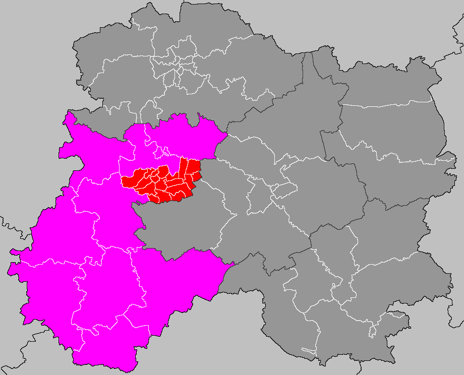 Localisation du canton d'Avize